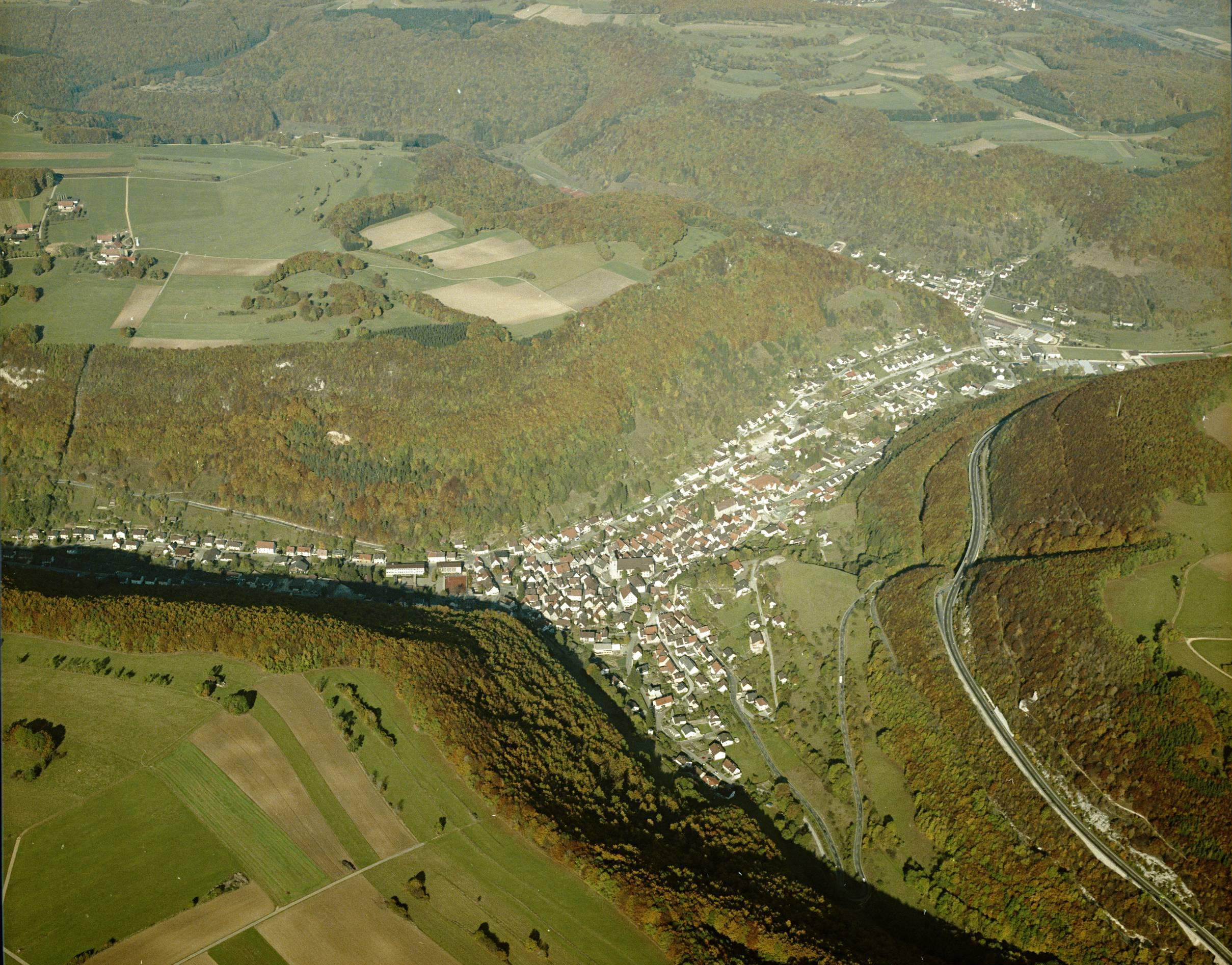 Luftbild von Wiesensteig - Staatsarchiv Sigmaringen - Archivalieneinheit N 1/96 T 1 Nr. 866